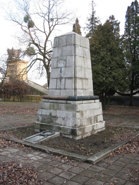 Стела погибшим в Галиции в 1914-1915 годах русским воинам Стела погибшим в Галиции в 1914-1915 годах русским воинам, Холм Славы, Львов